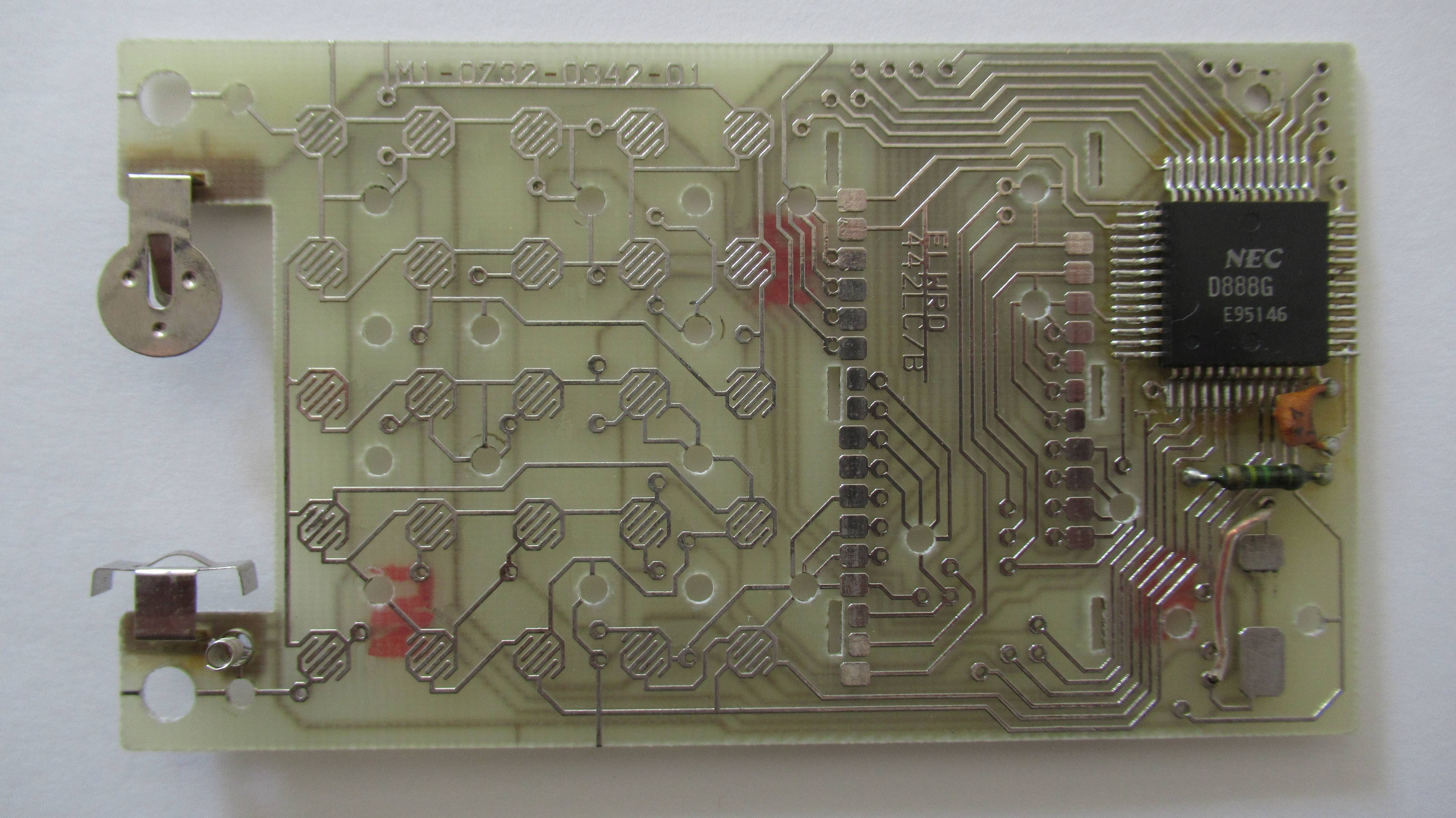 Płytka polskiego kalkulatora „Elwro 442LC «Jacek»”.